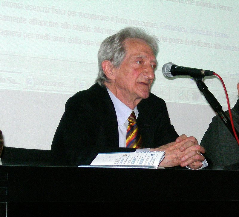 Il dibattito: E. SANGUINETI E WIKIPEDIA, L’ENCICLOPEDIA ORIZZONTALE con E.Sanguineti (Genova 17 giugno 2006) evento a cura di Gregorio Bisso - Festival Internazionale di Poesia di Genova - Edoardo Sanguineti